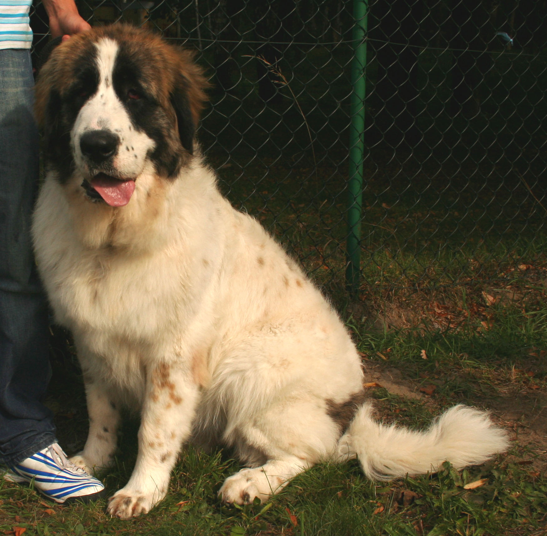 Mastif pirenejski na wystawie krajowej w Rybniku - Kamineiu